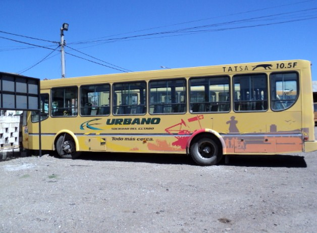 urbANO LA EMPRESA DE TRANSPORTES DE caleta